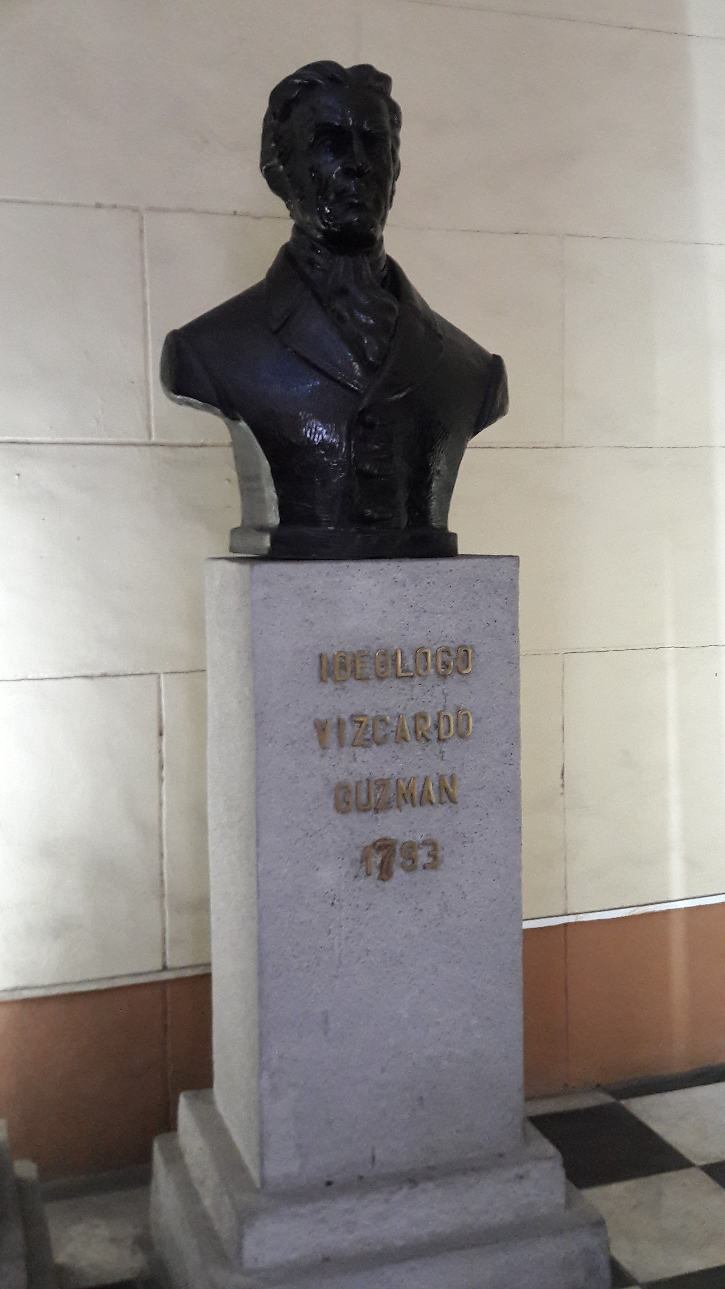 Ideologo Vizcardo Guzmán 1793